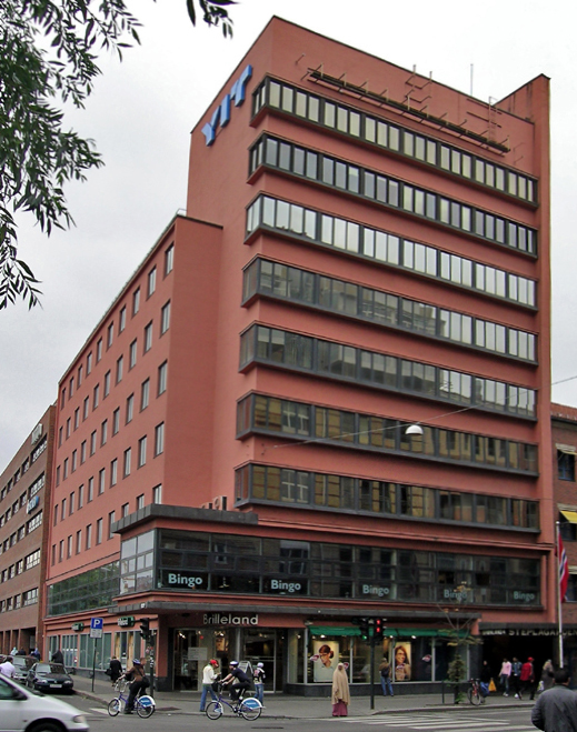 Steplagården, Grønland 4, Oslo. Built 1932. Architect: Nicolai Beer.